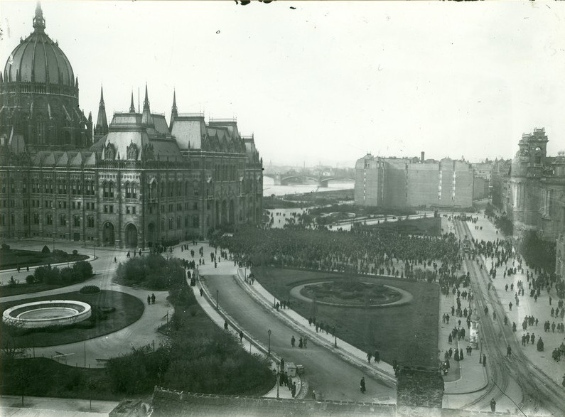 Manifestación en favor del Consejo Nacional Húngaro y la presidencia de Mihaly Károlyi en Budapest, 27 de octubre de 1918.